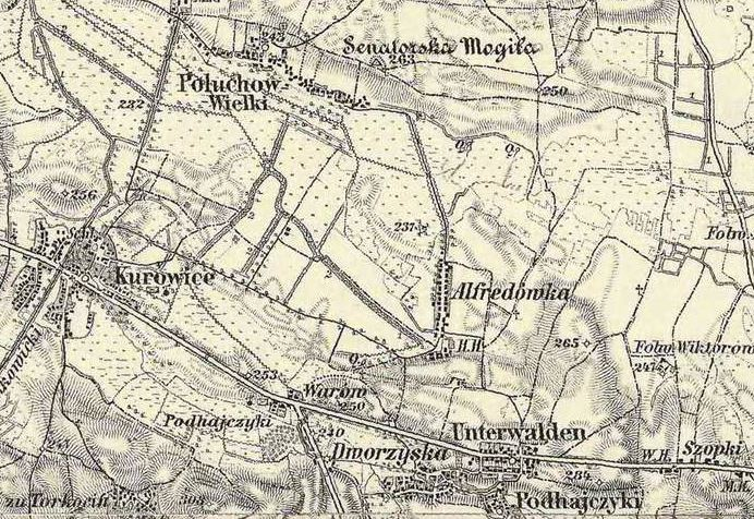 Косичі(Касичі,Альфредувка) на карті до 1887р